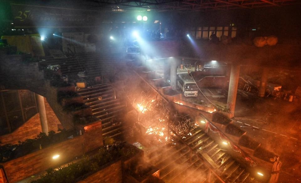 學生退守校內並設置路障及焚燒